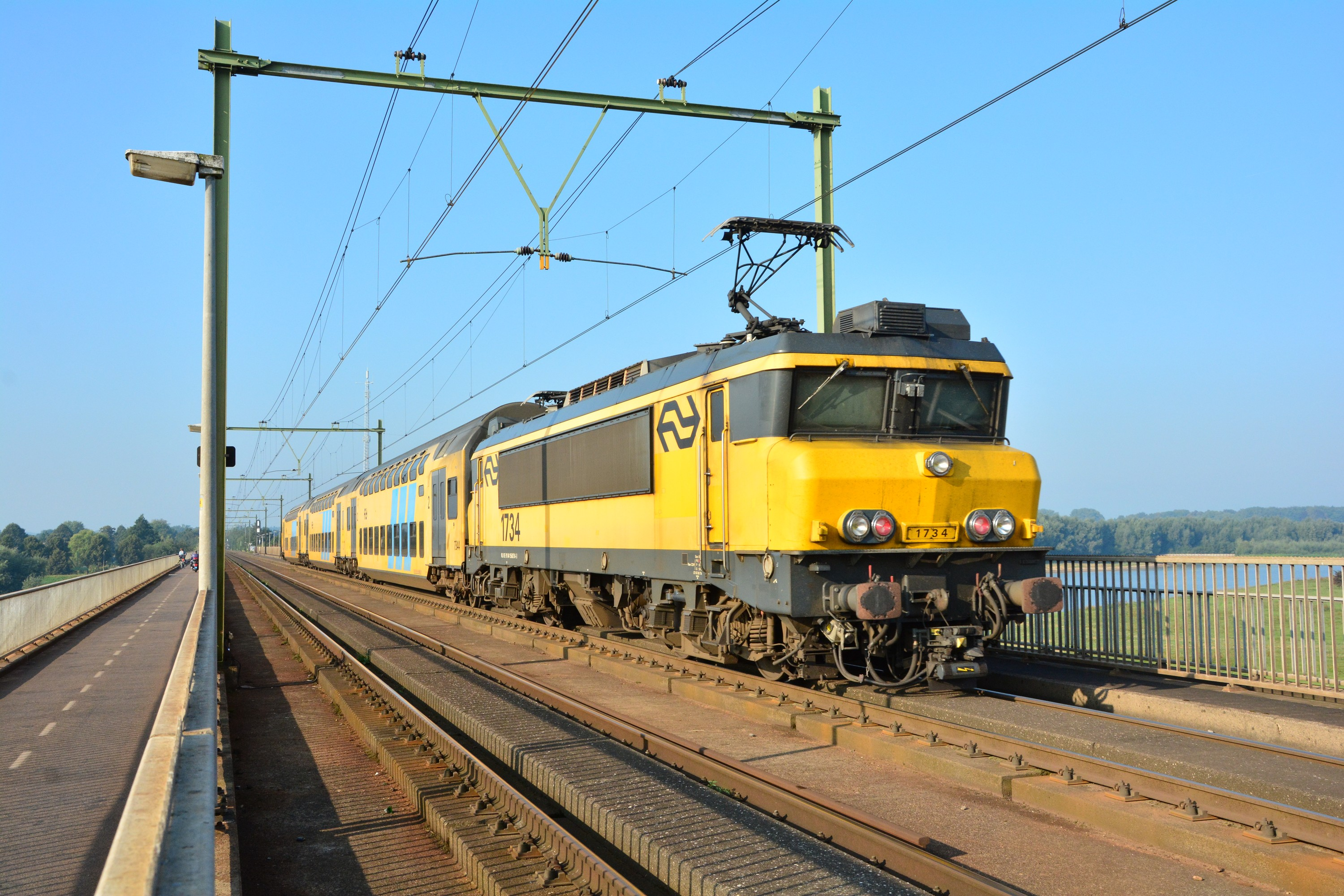 NS 1734 met DD-AR op de IJsselbrug Deventer